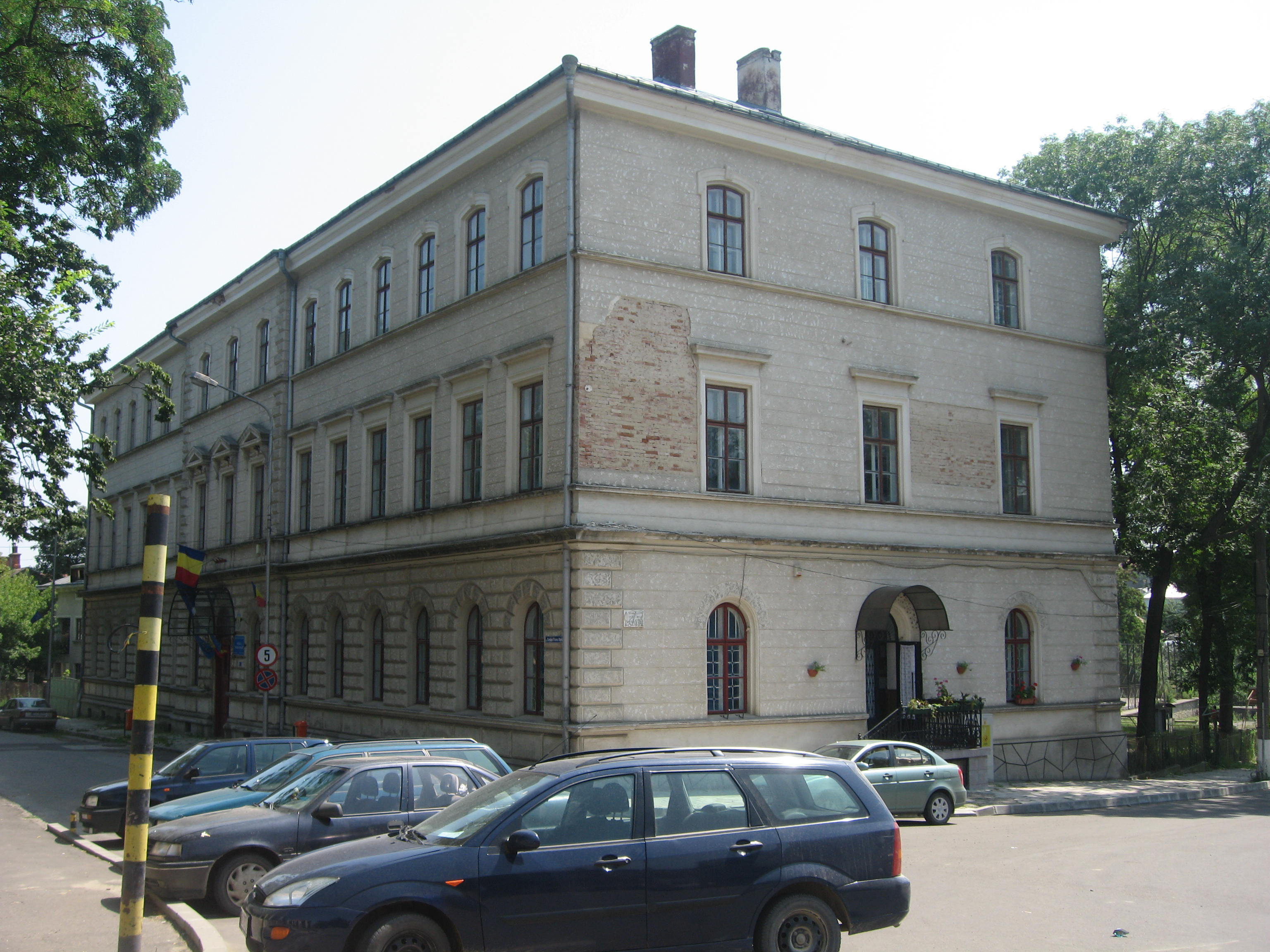 Școala Petru Mușat din Siret, clădirea fostului liceu "Lațcu Vodă"